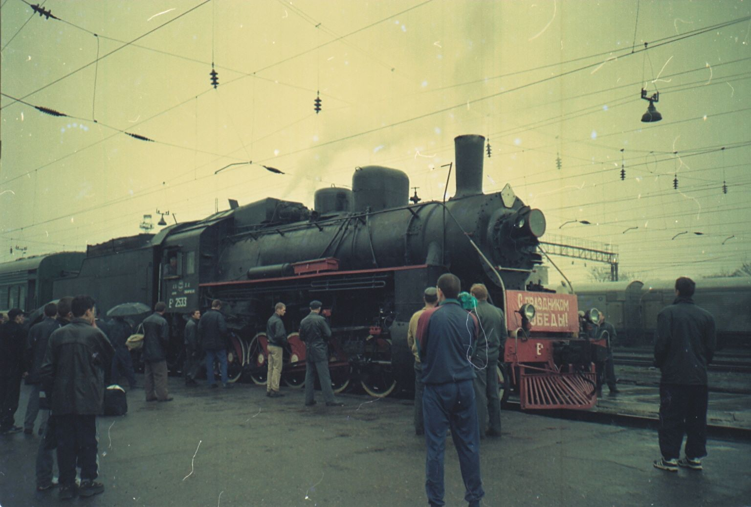 9 мая 2005, паровоз Еа-2533 привел "поезд Победы" на ст. Уссурийск